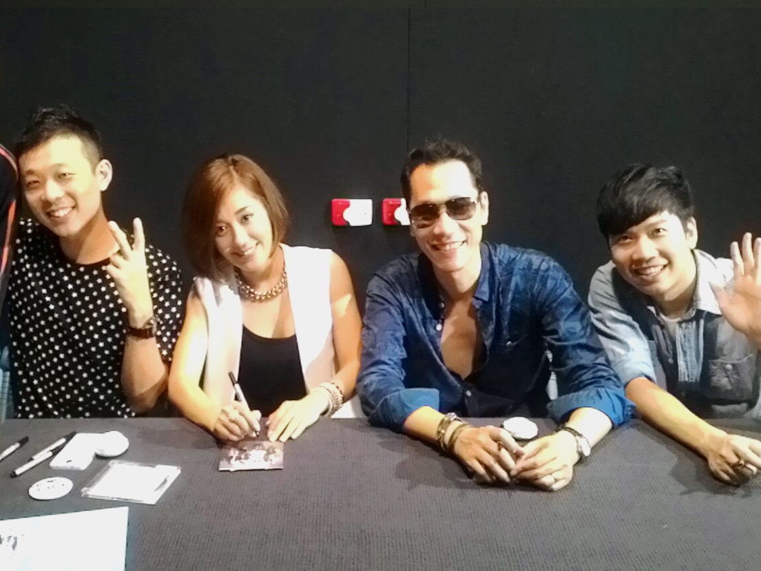 小男孩樂團簽唱